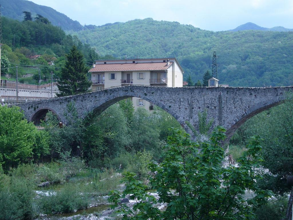 Ponte presso il fiume Scrivia, Ronco Scrivia, Liguria, Italy